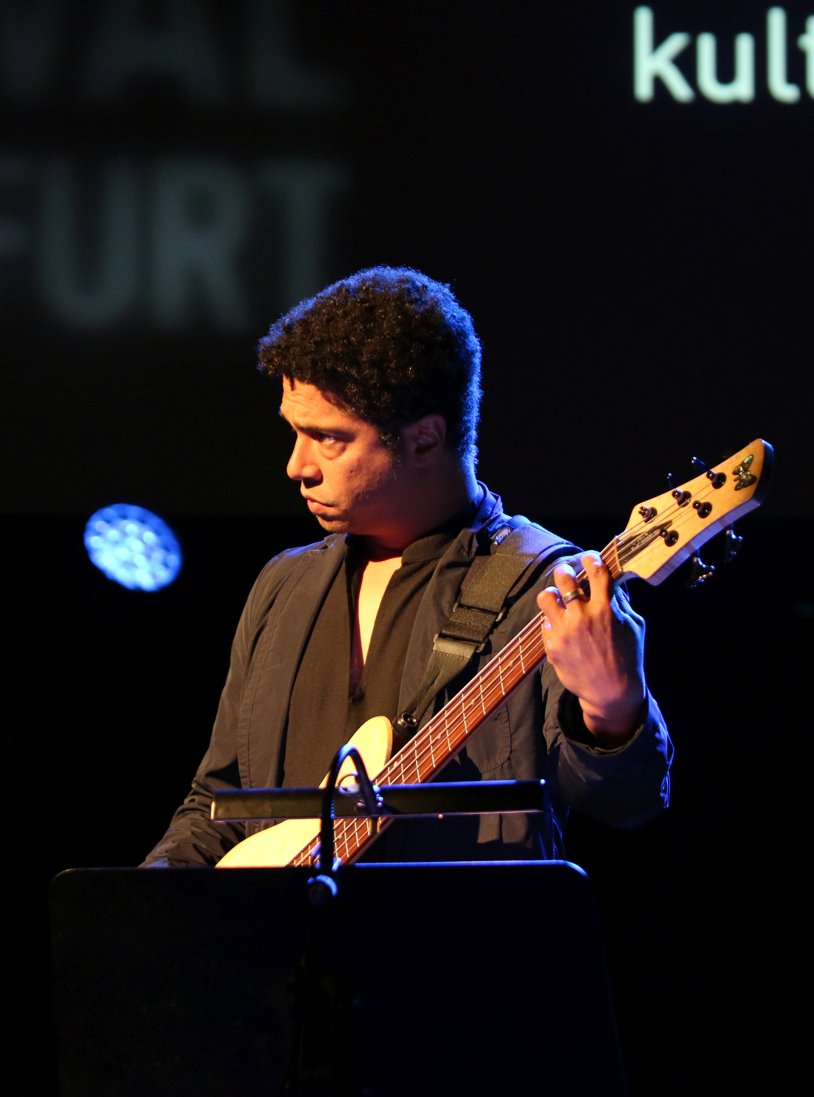 46. Deutsches Jazzfestival Frankfurt 2015: Matt Garrison